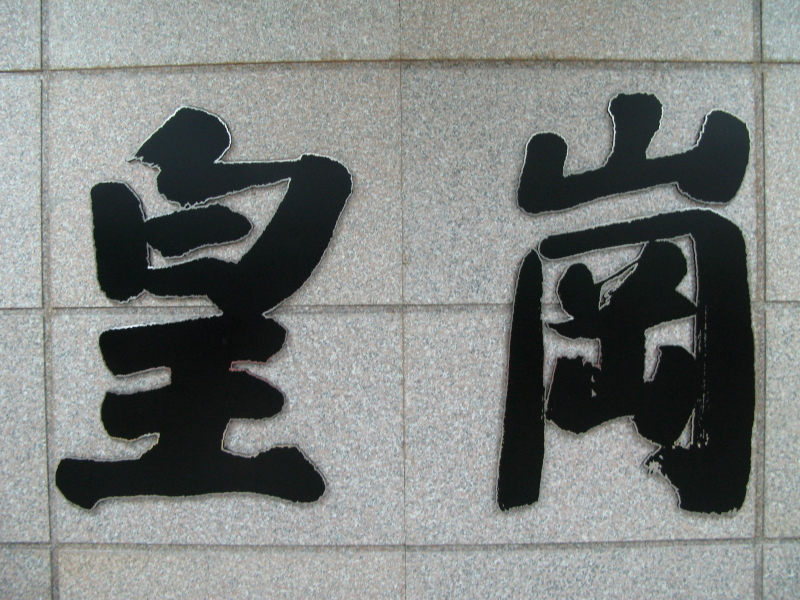 ShenZhen Metro Huang Gang Station Ident